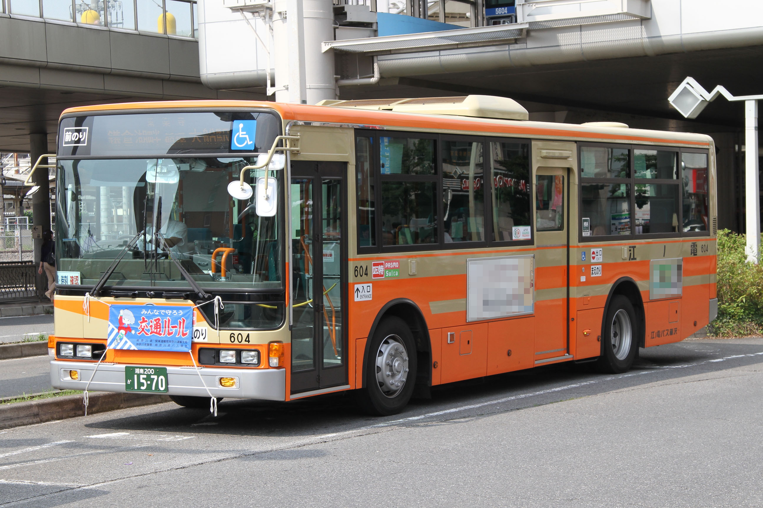 Enoden Bus Fujisawa car 江ノ電バス藤沢の車両